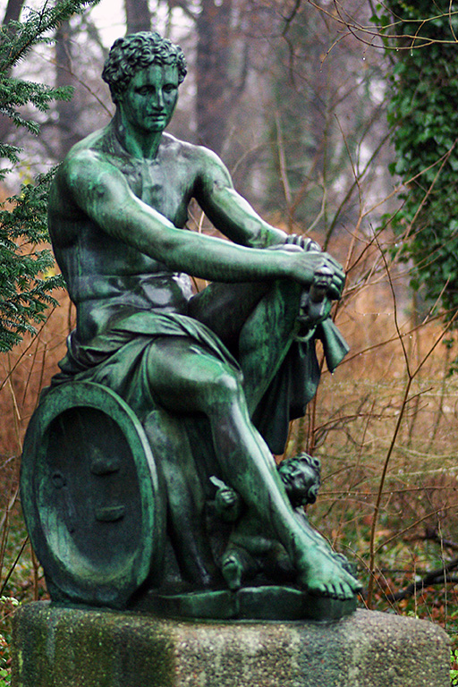 Die Skulptur Ares findet sich vor dem Eingang zur Zitadelle Spandau. Es handelt sich um eine Bronzekopie nach dem Original von Lysipp.